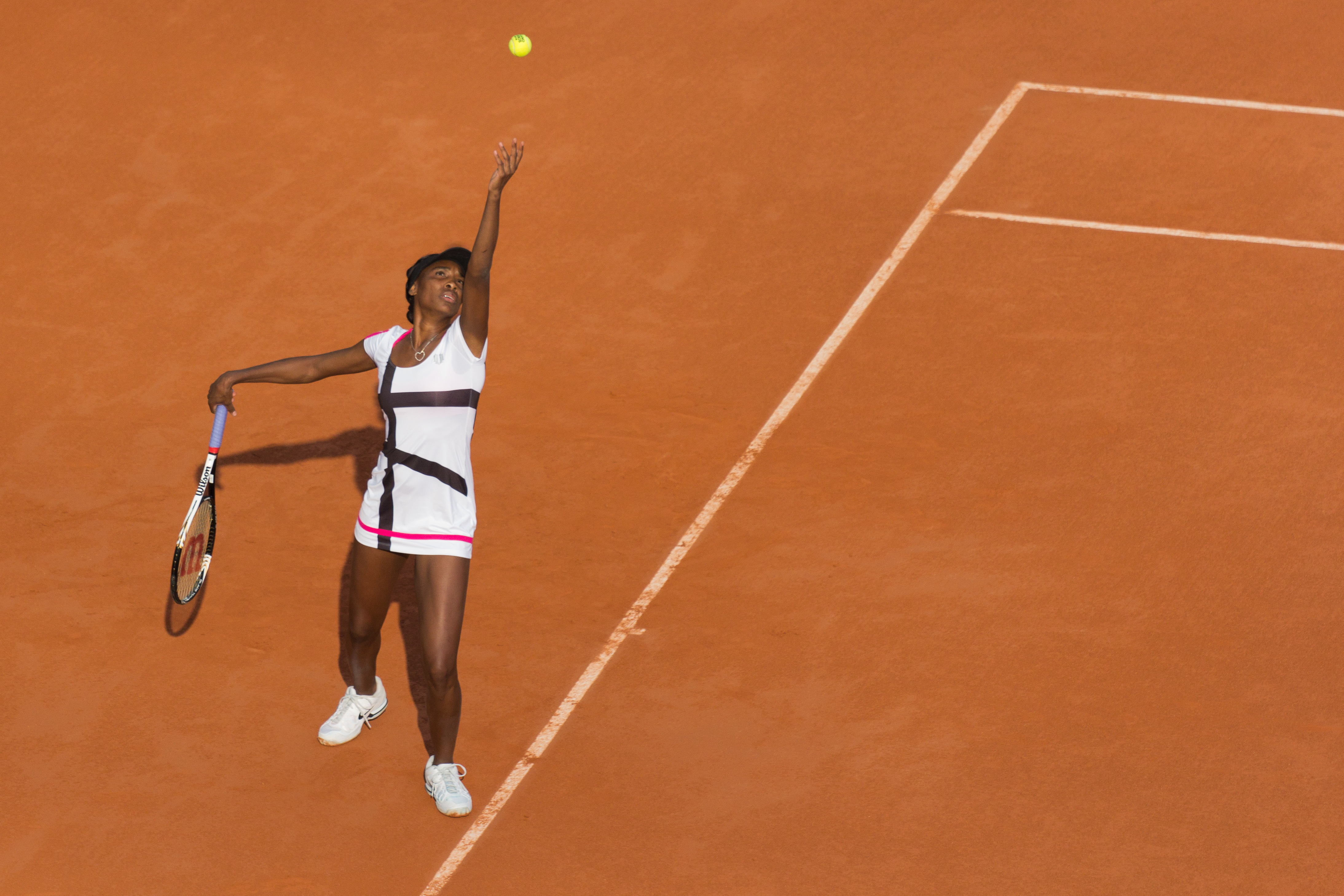 Venus Williams à Roland-Garros le 27 mai 2012, match contre Paula Ormaechea. Paris, France